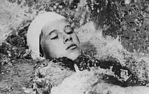 Sabine Steinbach, Sabine Rantzsch, Doris Kohardt Zentralbild Kluge (2)-Ksch 5.9.1968 Berlin: DDR-Teilnehmer der XIX. Olympischen Sommerspiele vom 12.-27.10.1968 in Mexiko-Stadt Schwimmen-Frauen: Oben: Sabine Steinbach (SC Karl-Marx-Stadt), Mitte: Sabina Rantzsch (SC DHfK Leipzig), unten: Doris Kohardt (Empor Rostock). Information added by Wikimedia users. Doris Kohardt